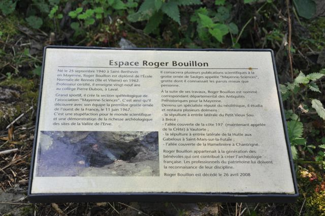 Plaque commémorative Roger Bouillon